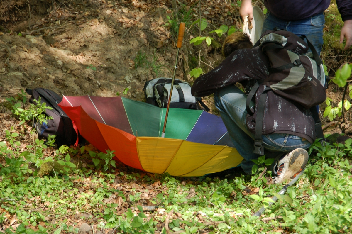 Regenschirm als Fangtrichter beim Klopfen, Steinau bei Schlüchtern, Main-Kinzig-Kreis, Hessen, Deutschland